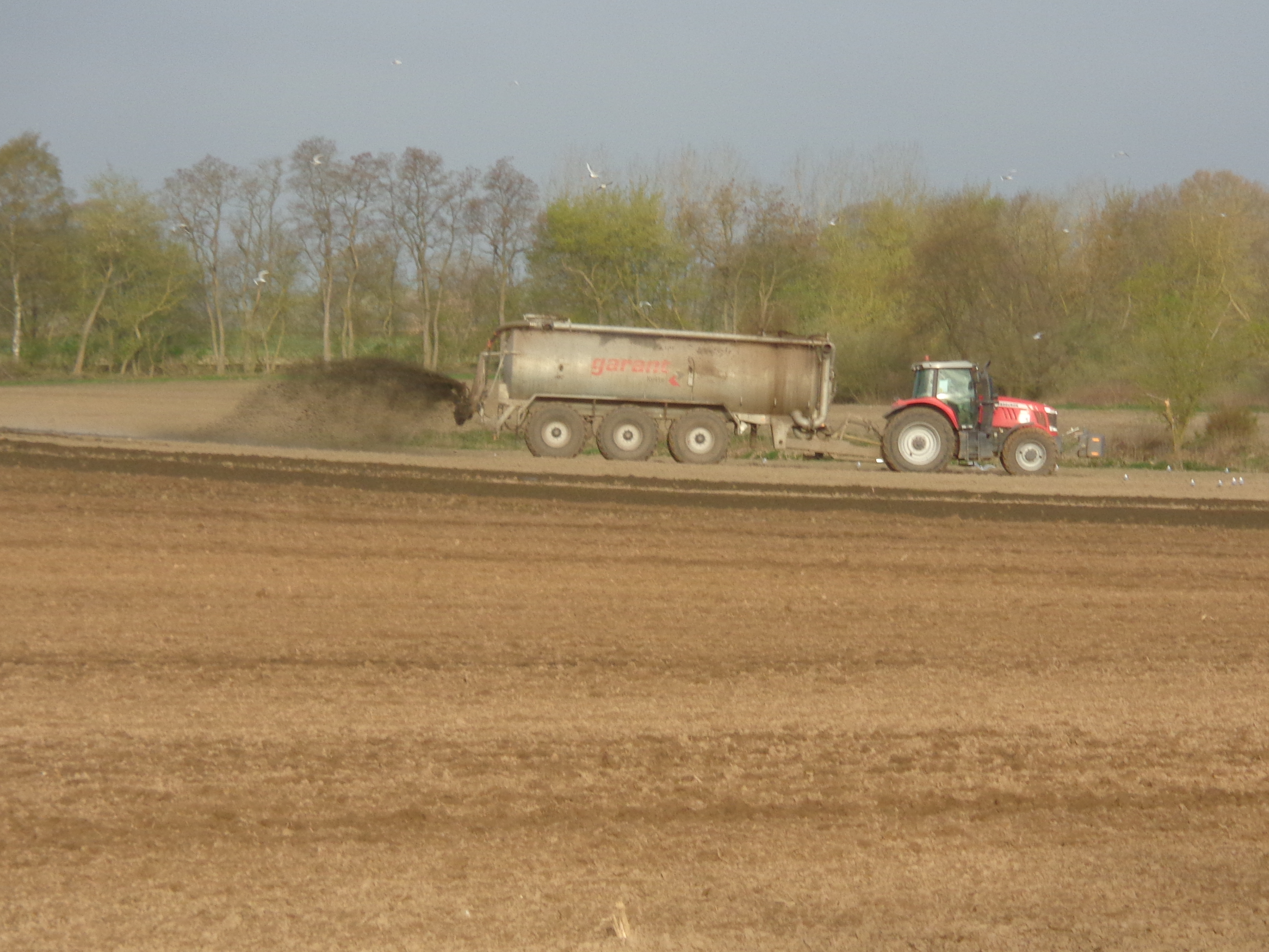 Pumptankwagen-Gespann beim Ausbringen von Gülle in Plau am See